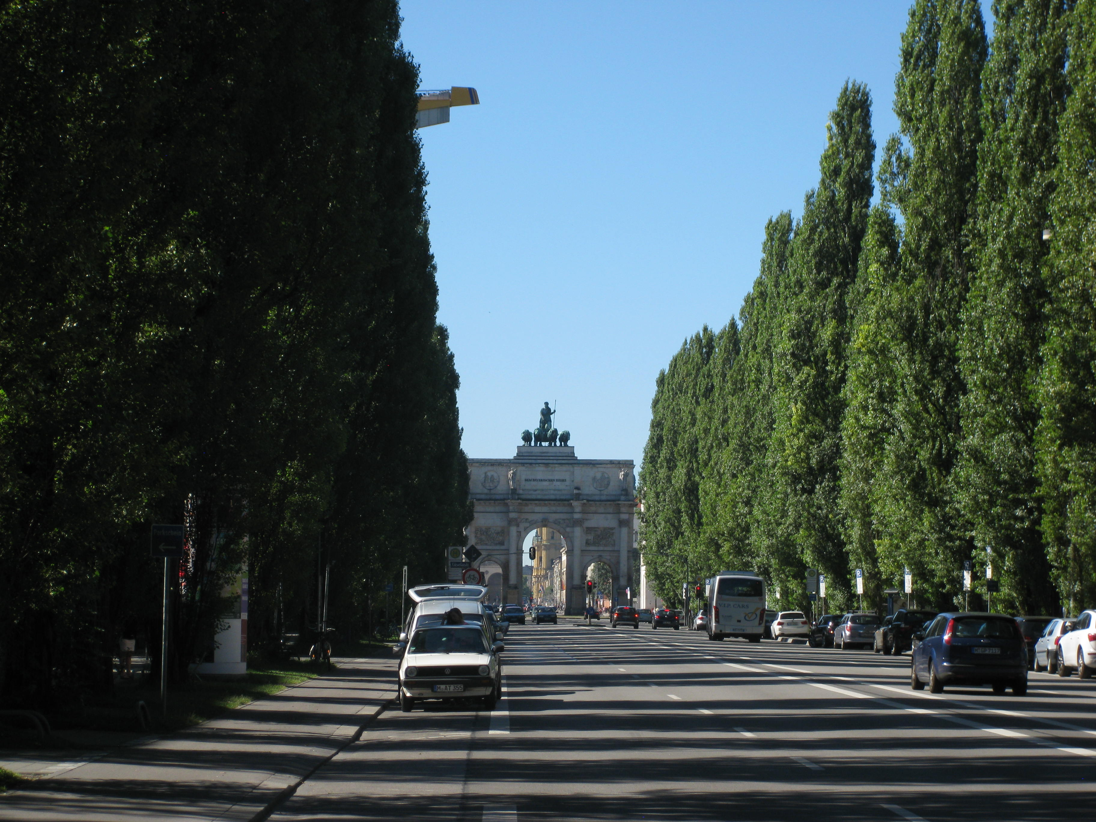 leopoldstr. münchen